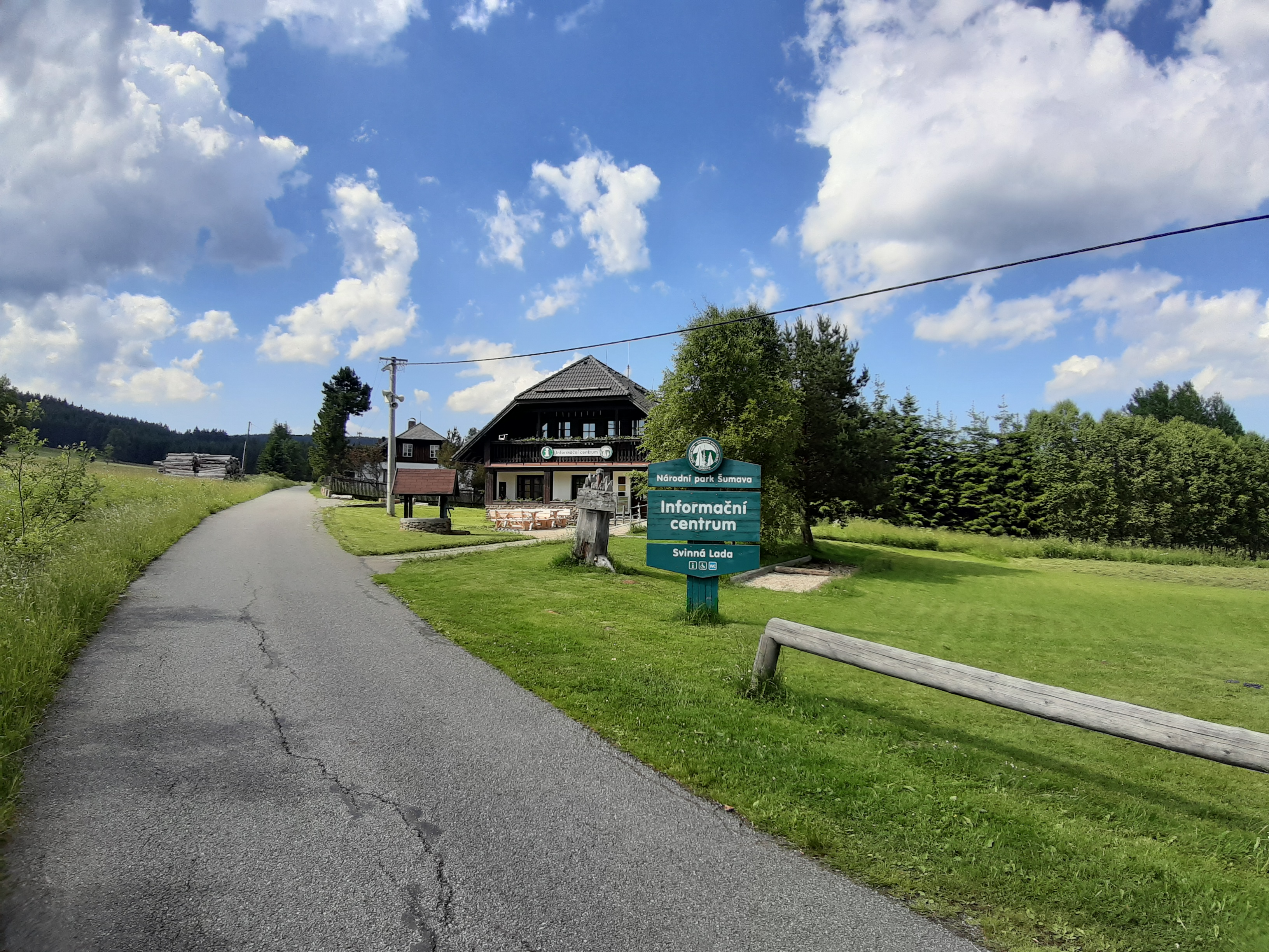 Chalupská slať (Šumava).